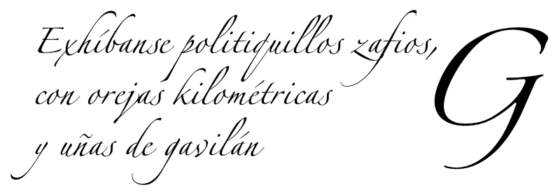 PangramaTipografía Zapfino